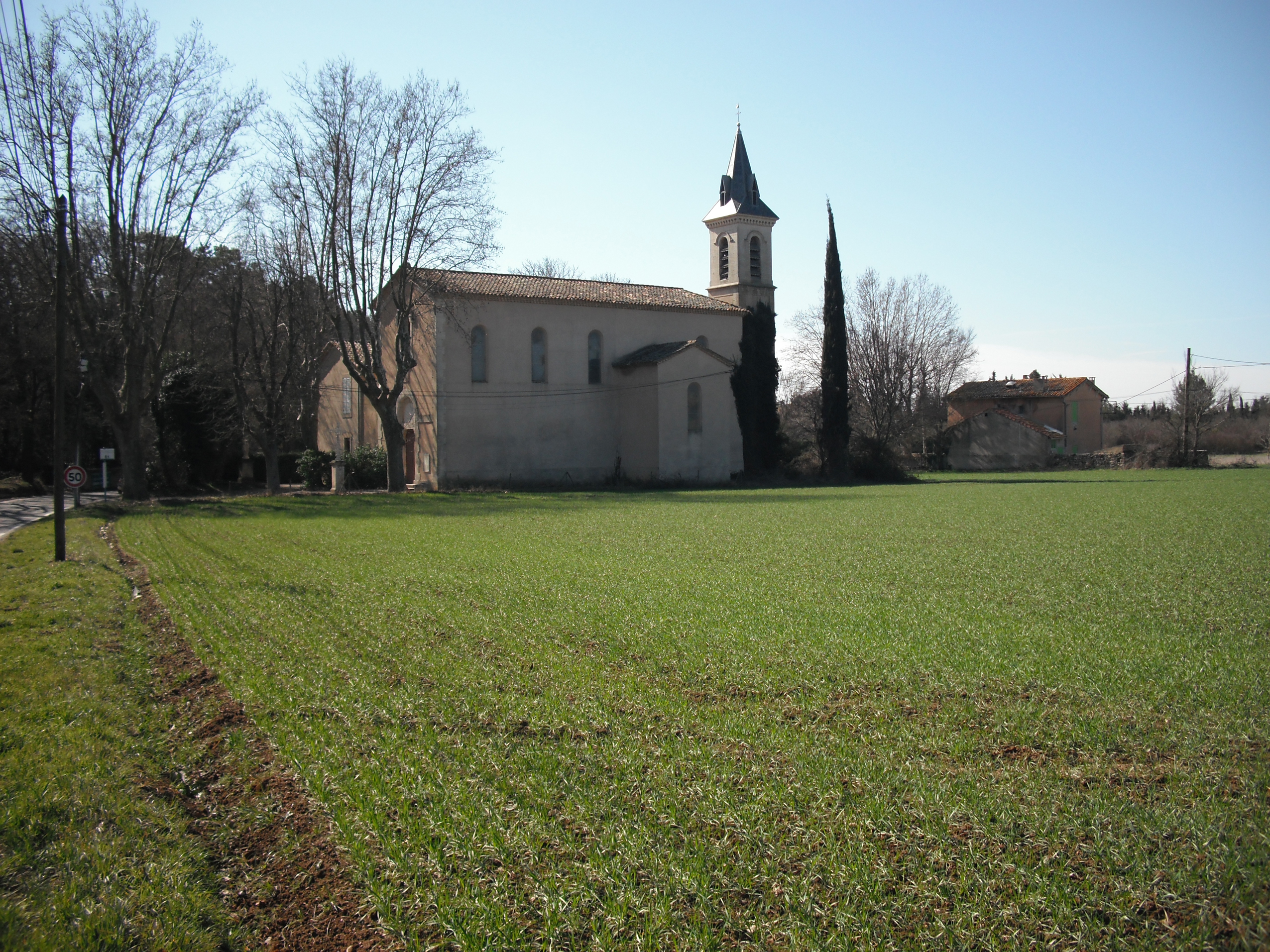 Église des Pinchinats (Aix-en-Provence)